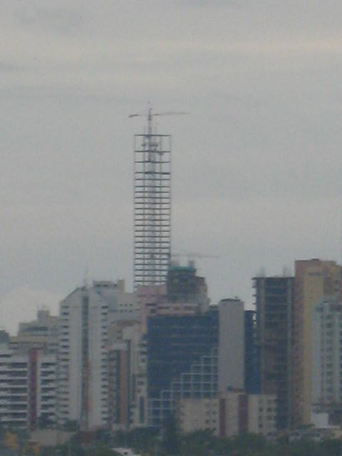 Torre de la Escollera - Cartagena Colombia